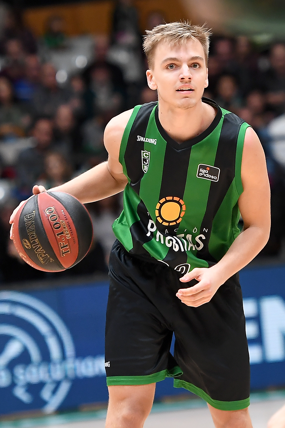 Arturs Zagars en un partit de l'ACB 2019-20 amb el Club Joventut Badalona